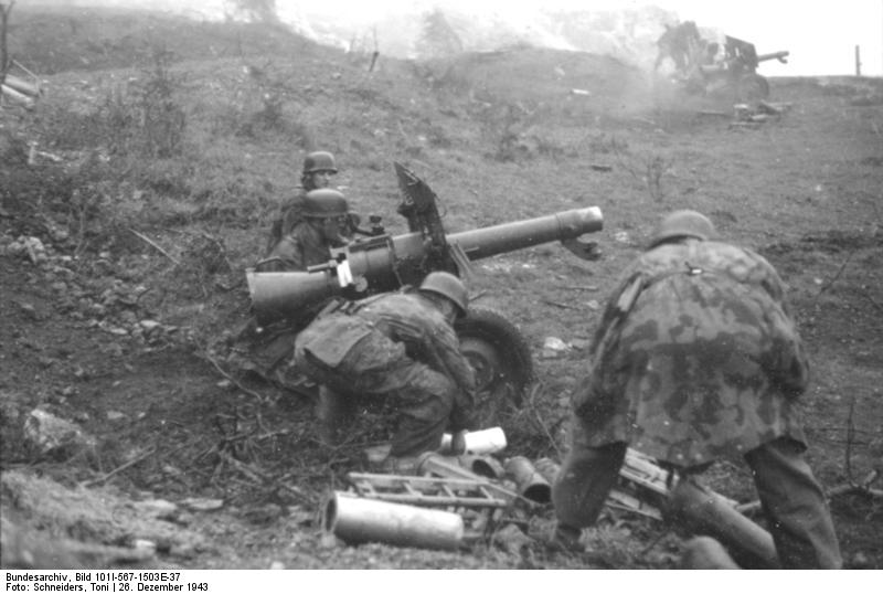 San Felice (Monte Circeo).- Besichtigung des Abschnitt Süd durch KG [kommandierenden General] Information added by Wikimedia users.Das Foto zeigt ein 10,5cm Leichtgeschütz 40.